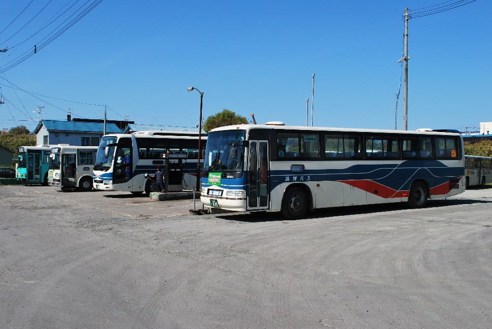 沿岸バスの車両。沿岸バス留萌営業所近隣の公道上で撮影